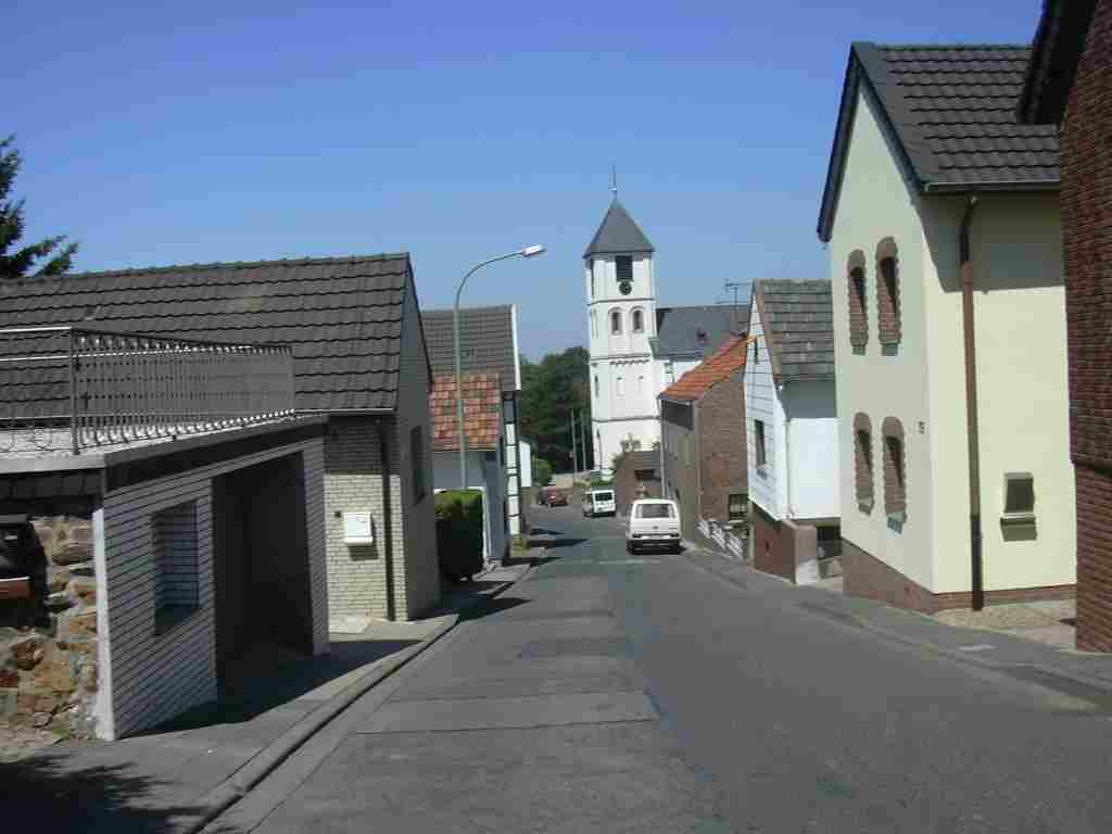 Birgel bei Düren, Bergstraße Own Work papa1234 Date: 2006-07-14